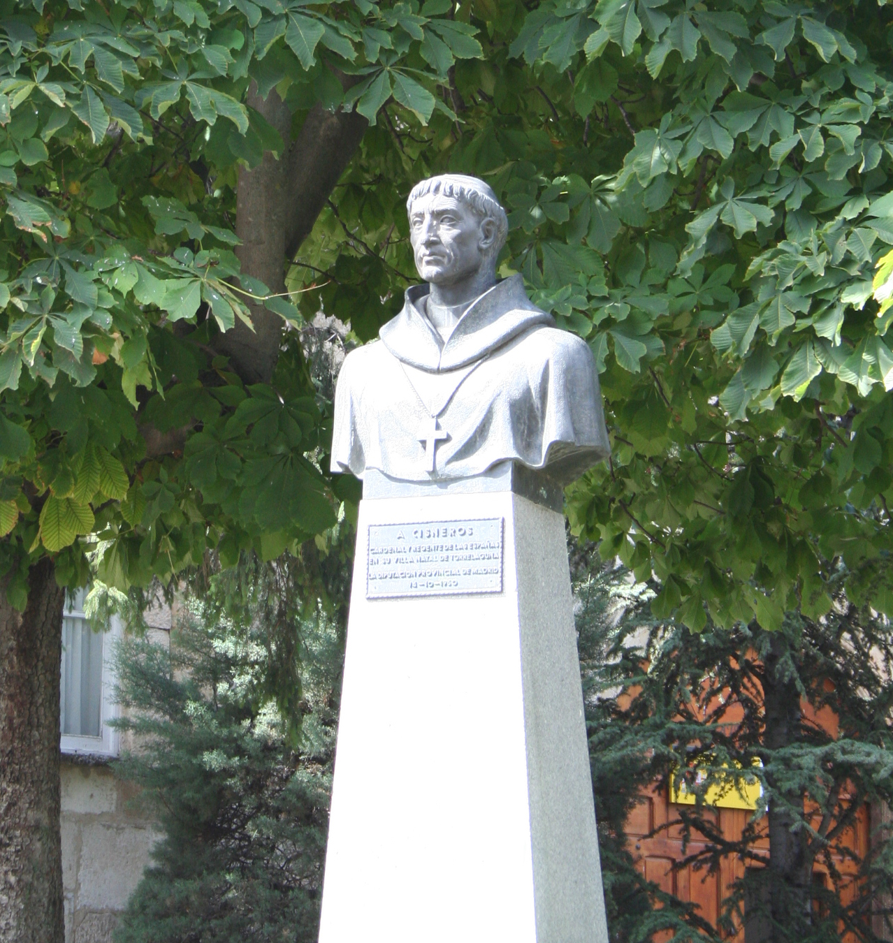 Busto Cardenal Cisneros - Villa de Torrelaguna (Madrid)